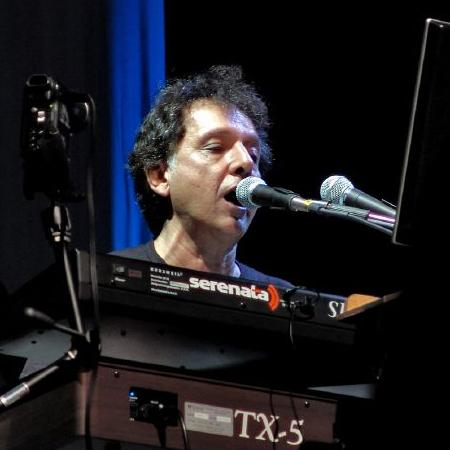 Arnaldo Dias Baptista in São Paulo